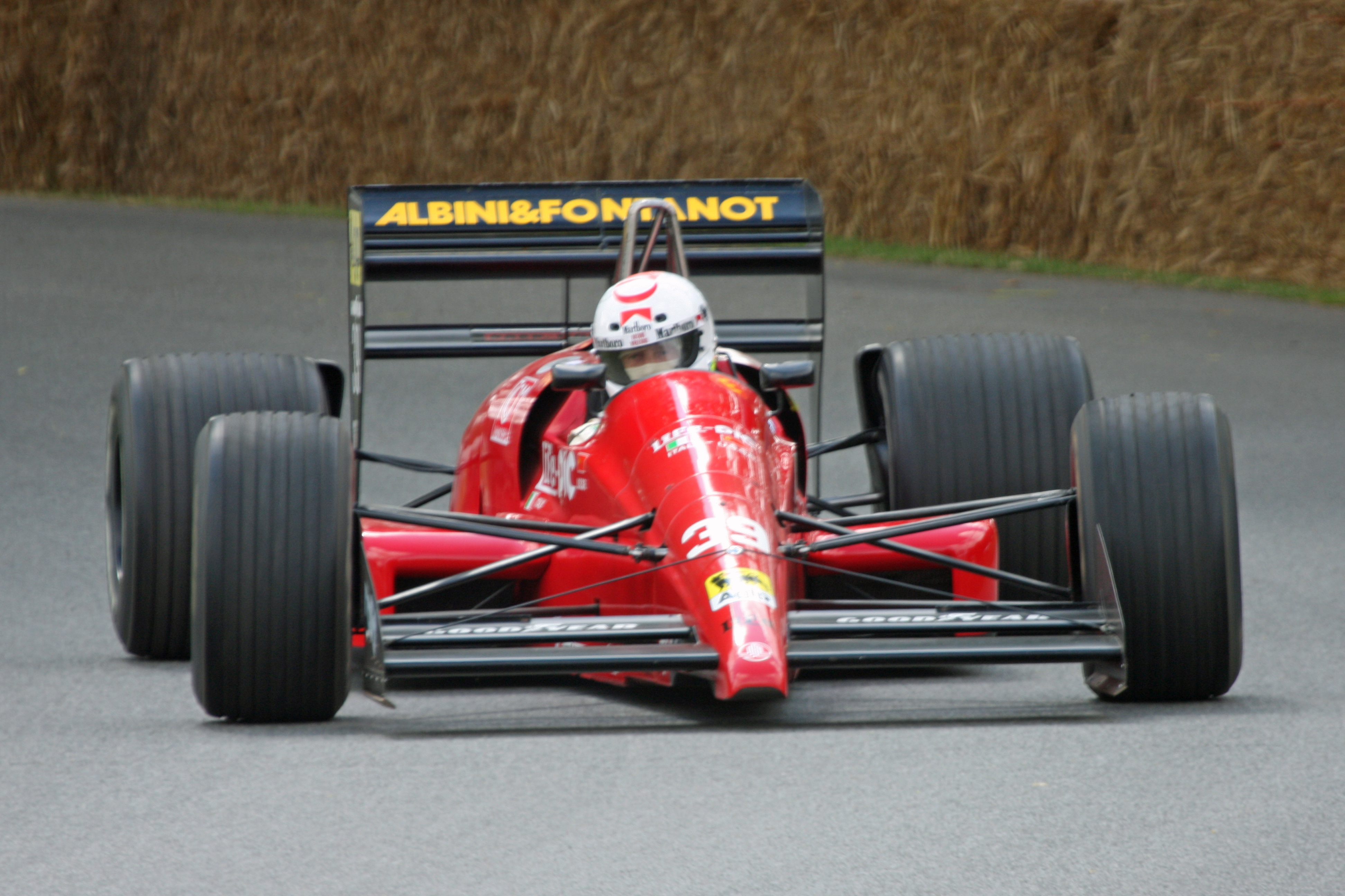 Goodwood